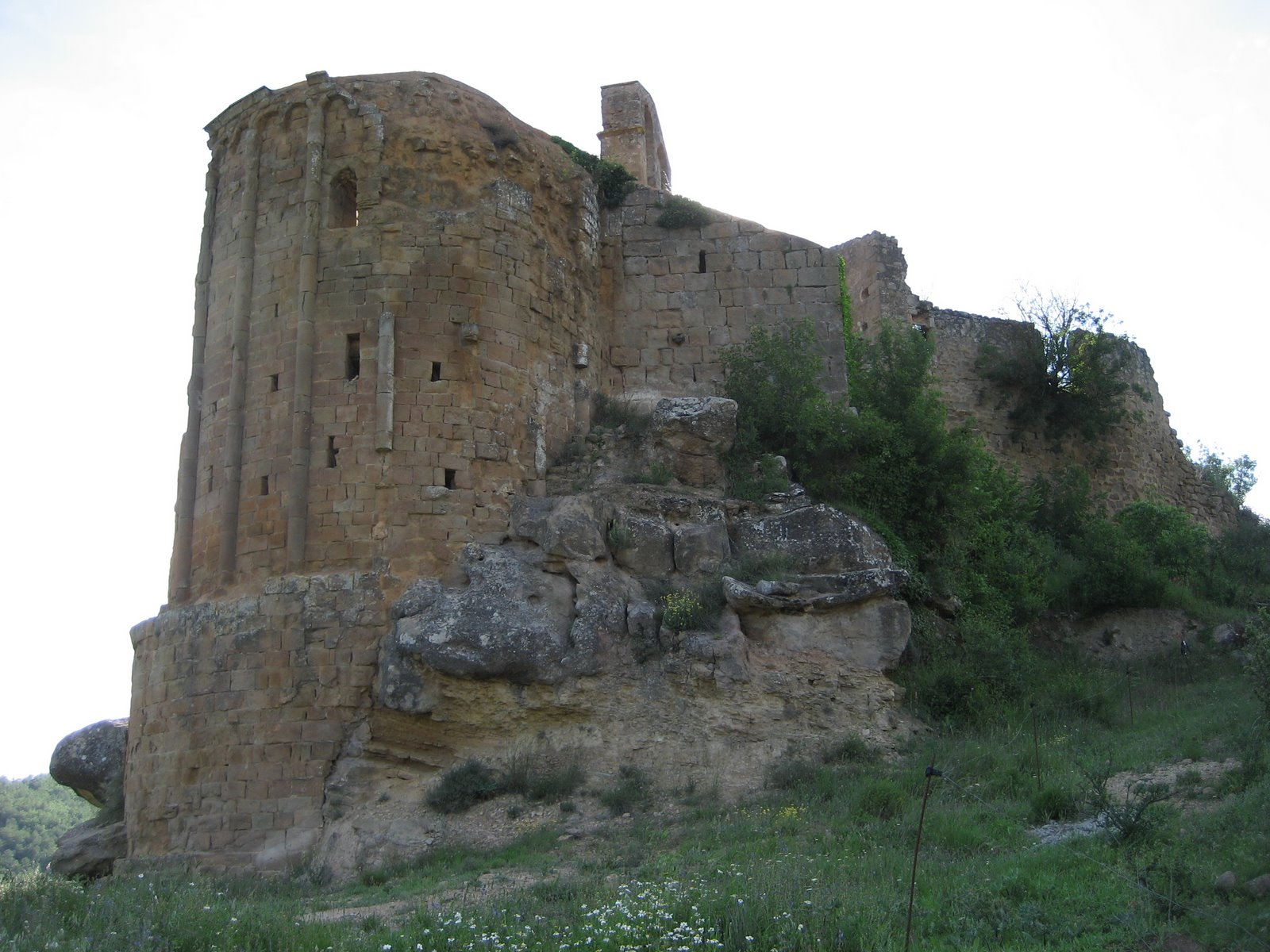 Les runes de l'antiga església de Madrona (Pinell de Solsonès)